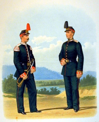 3-е Александровское военное училище. Горнист и Юнкер (парадная форма). 22 Марта 1874.